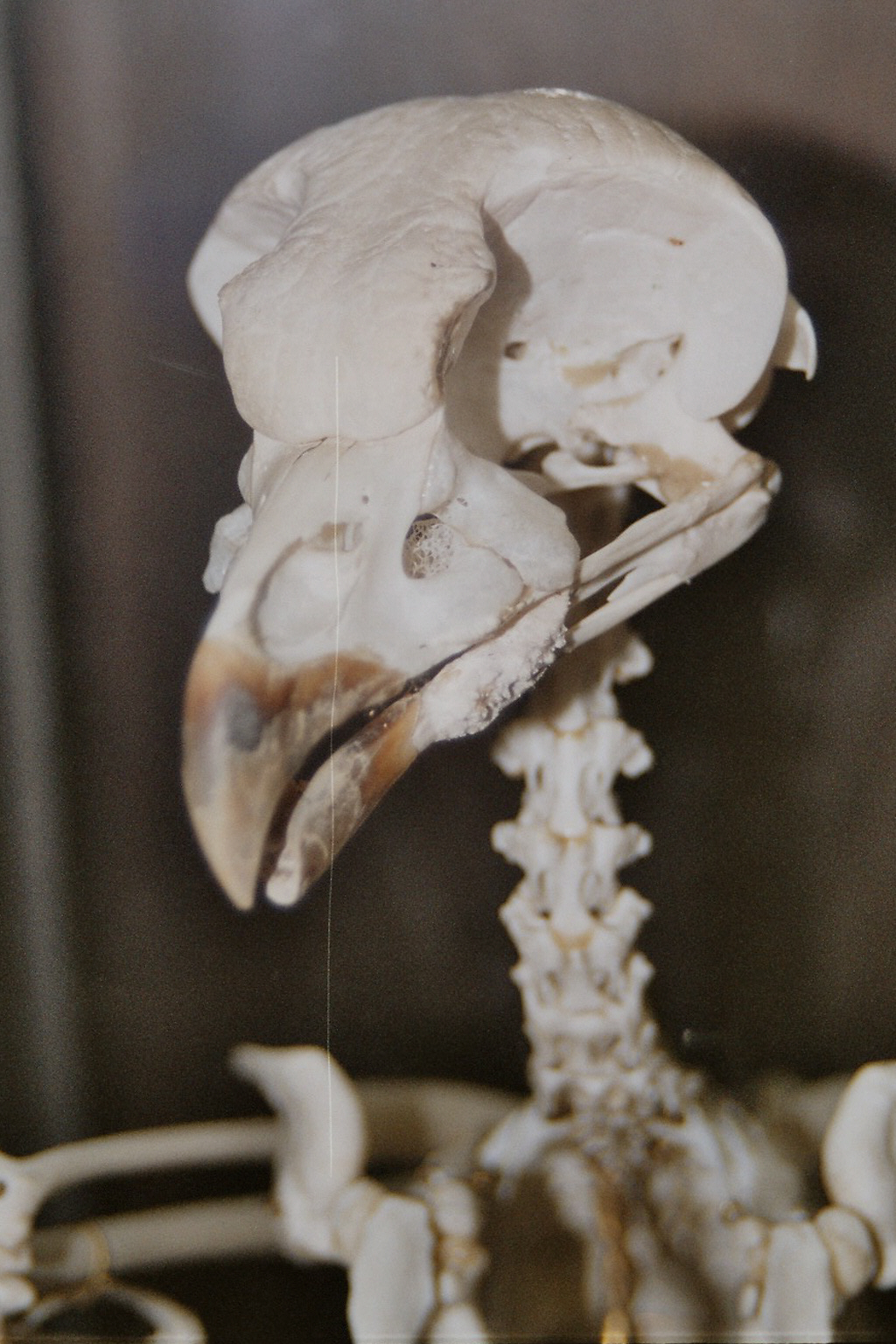 Skelettkopf eines Uhu, fotografiert von BS Thurner Hof 22:48, 4. Jan 2005 (CET) gemeinfrei, Public domain 29.12.04